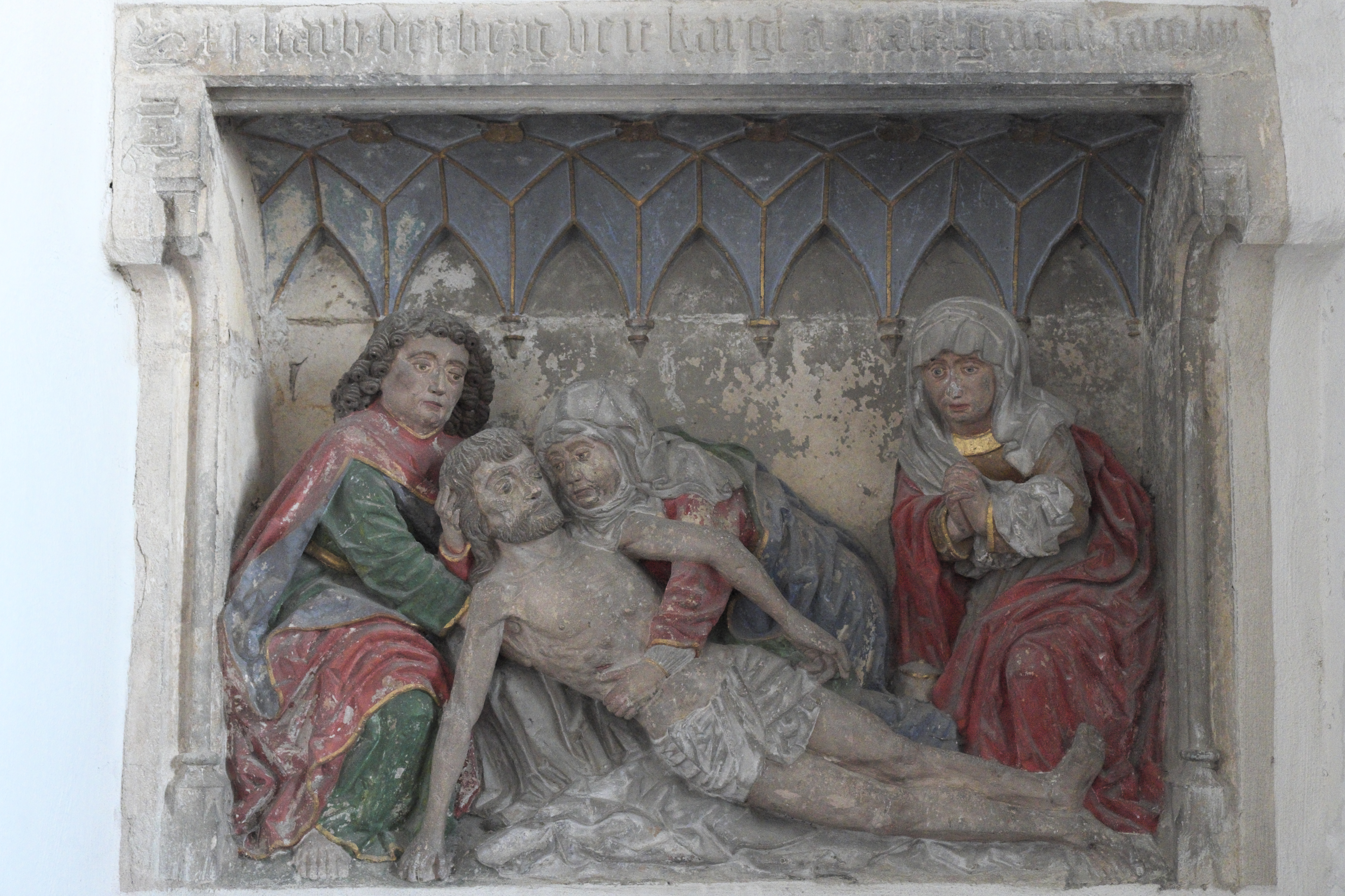 Alte katholische Pfarrkirche St. Peter in Straubing (Bayern/Deutschland), Epitaph für Veit Kargl von 1511, mit einem Hochrelief der Beweinung Christi